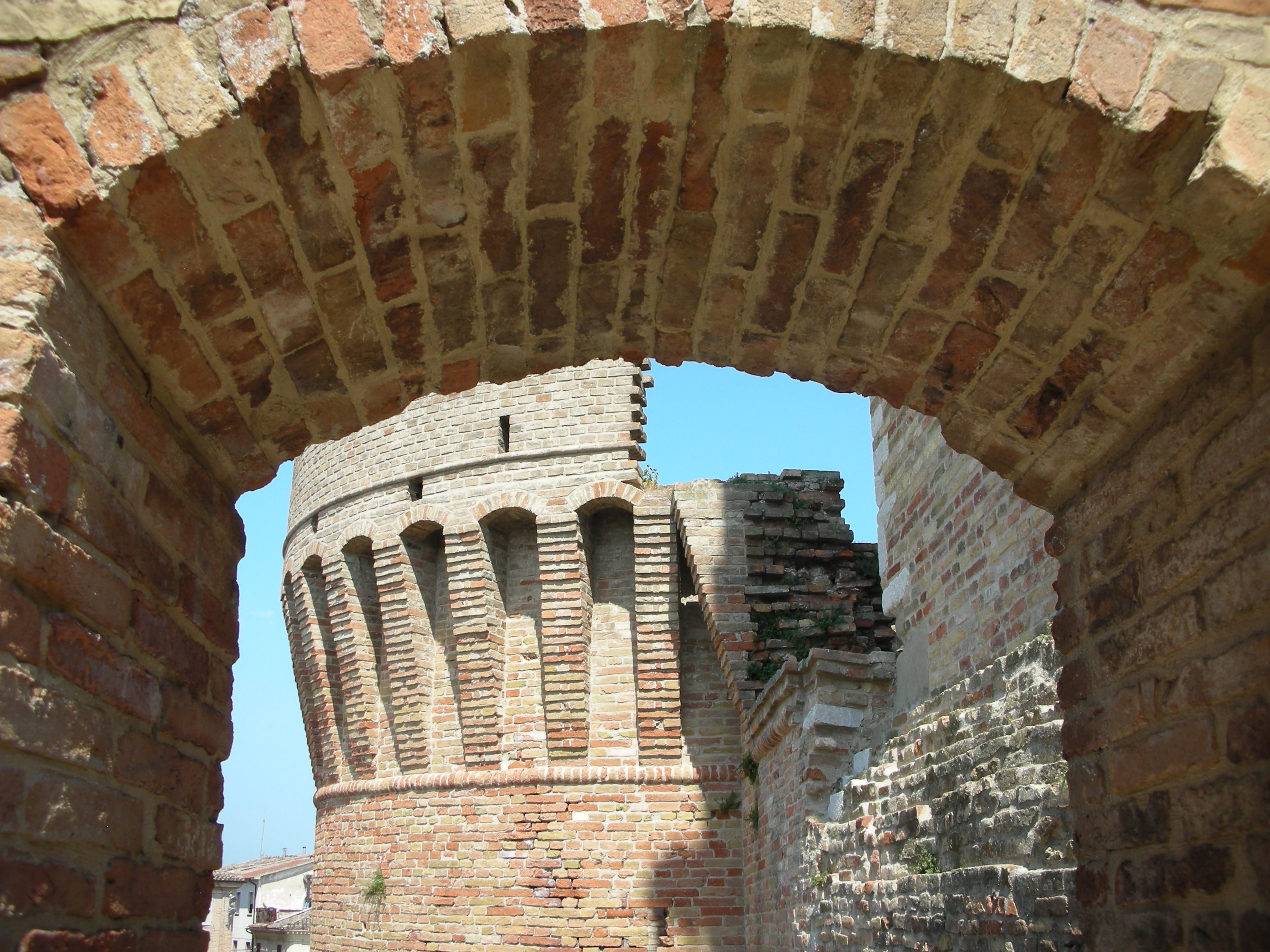 Rocca di Urbisaglia. Torre Nord vista dall'antica porta d'ingresso